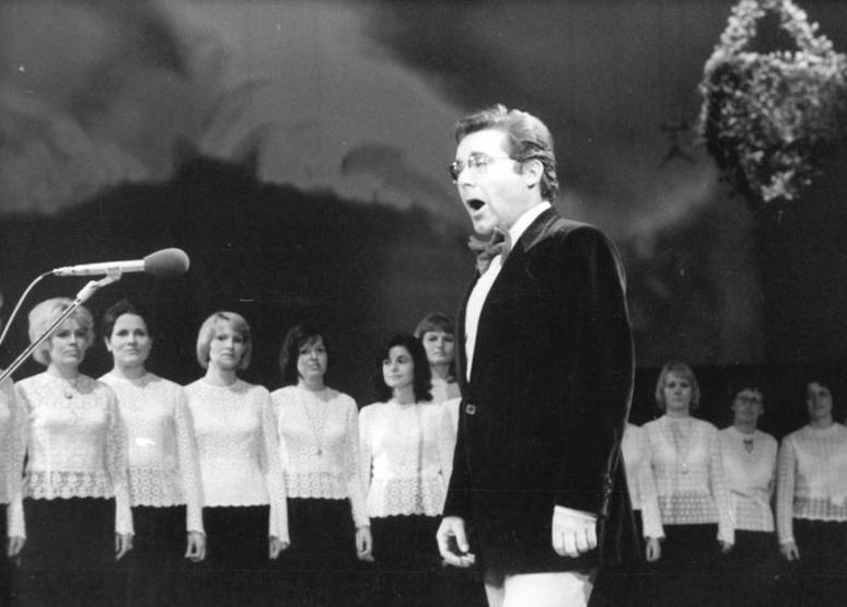 ADN-ZB Spremberg-23.4.76 Berlin: Festlicher Galaabend zur Eröffnung des Palastes der Republik Zu den bekannten Künstlern, die am 23.4.76 beim festlichen Galaabend zur feierlichen Eröffnung des Palastes der Republik mitwirkten, gehörte auch der bekannte Mozartinterpret Kammersänger Peter Schreier, der mit der Mozart-Arie "Im schönsten Wiesengrunde" das Publikum begeisterte. Achtung: Foto von der Generalprobe!